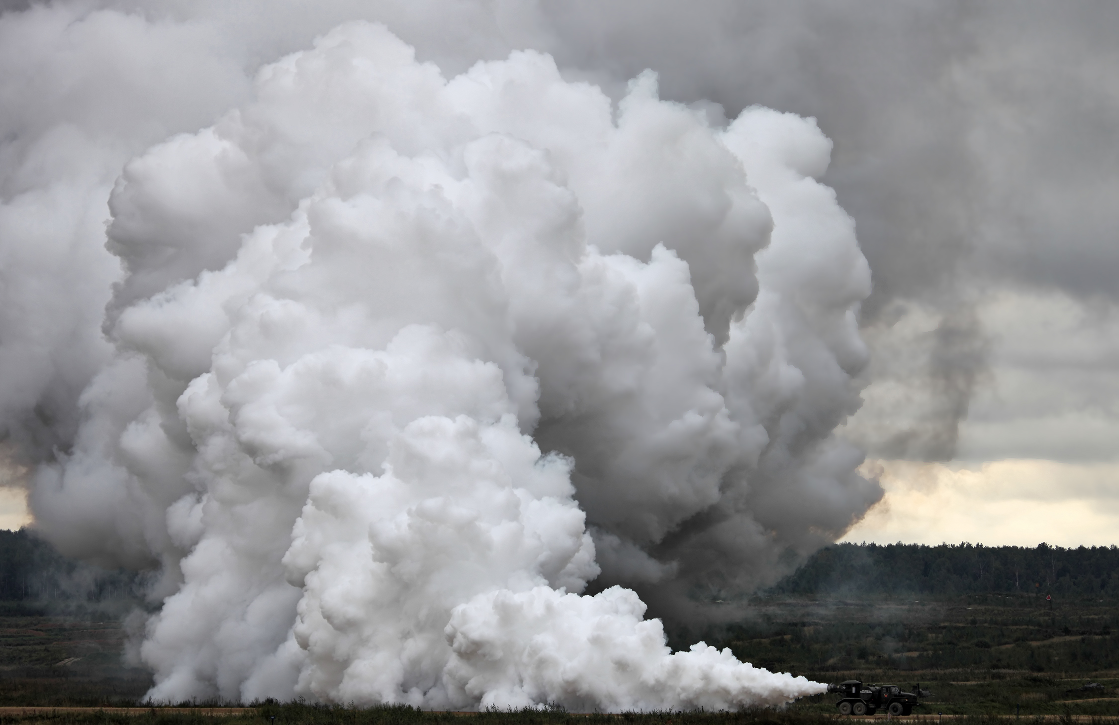 Тепловая машина специальной обработки ТМС-65У (TMS-65U decontamination vehicle)